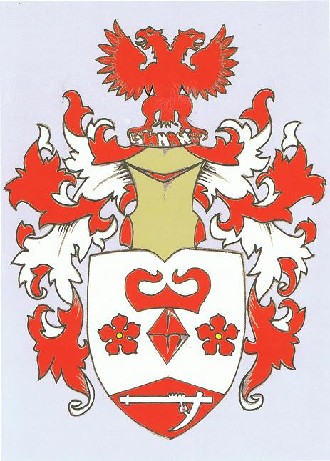 Family Arms